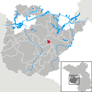 Borkwalde in Brandenburg (Country) - District Potsdam-Mittelmark